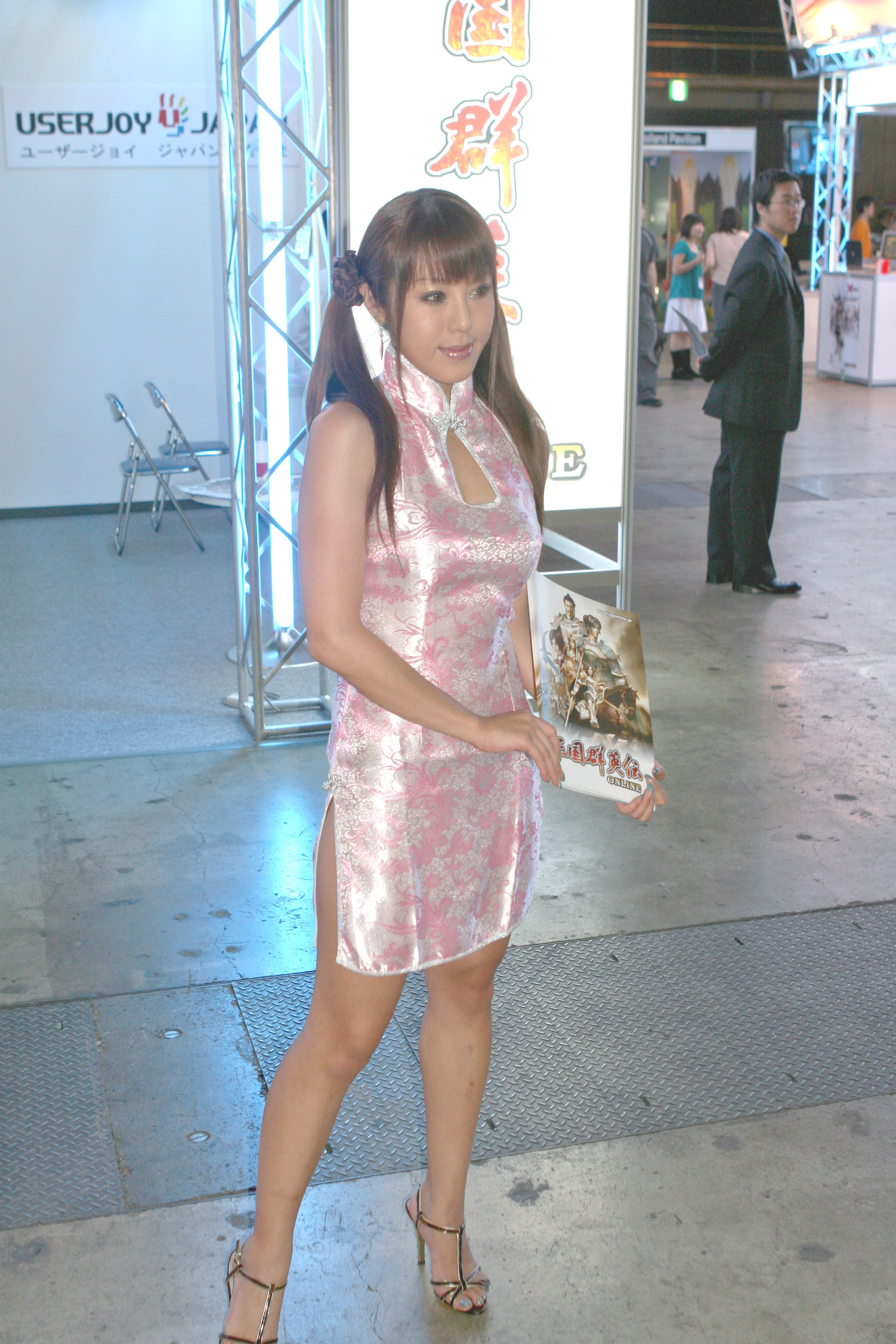 2007東京電玩展，UserJoy Japan（宇峻奧汀科技日本子公司）攤位的宣傳模特兒。